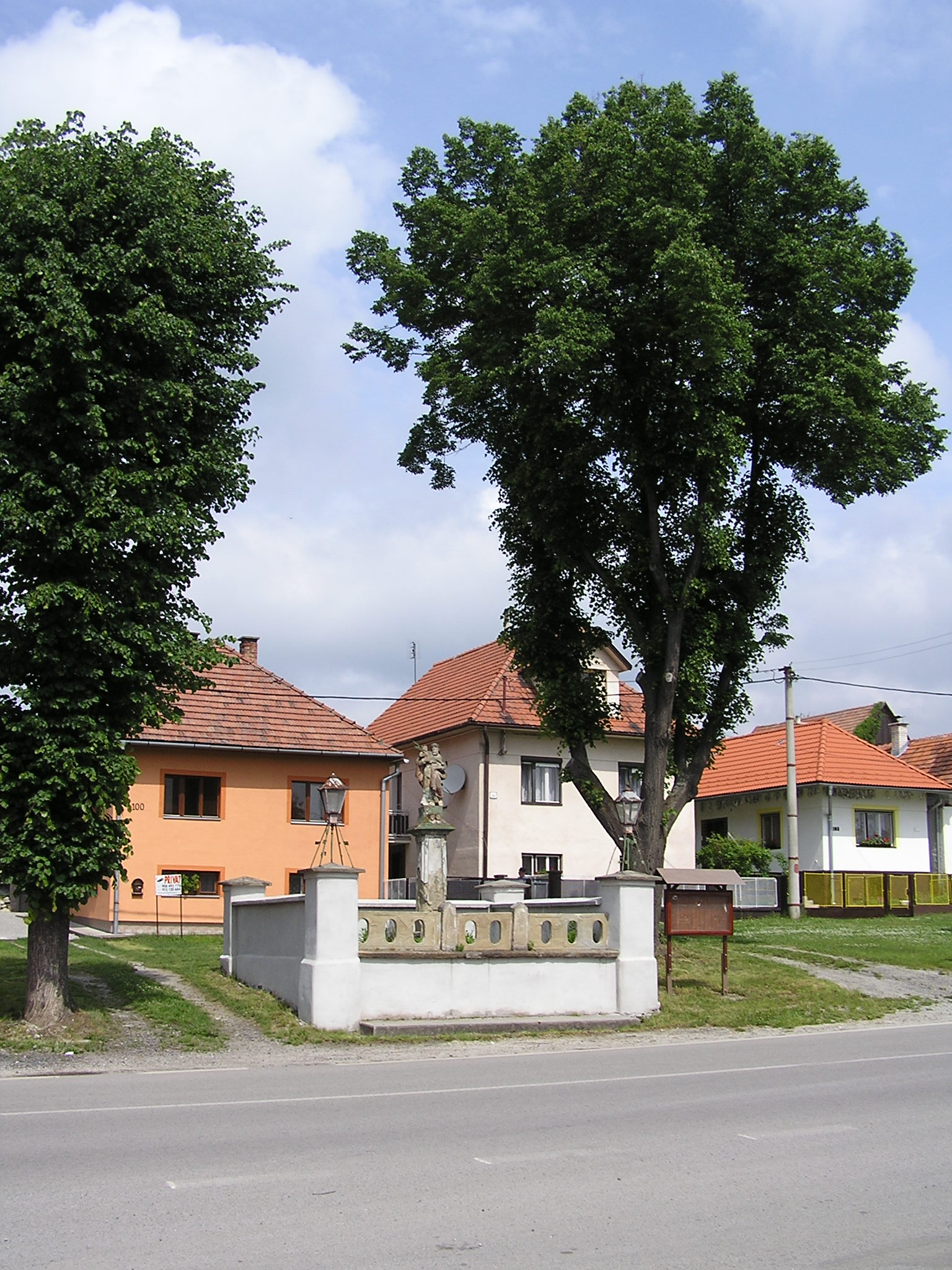 Súsošie sv. Jozef s dieťaťom v obci Bobrovec, región Liptov.